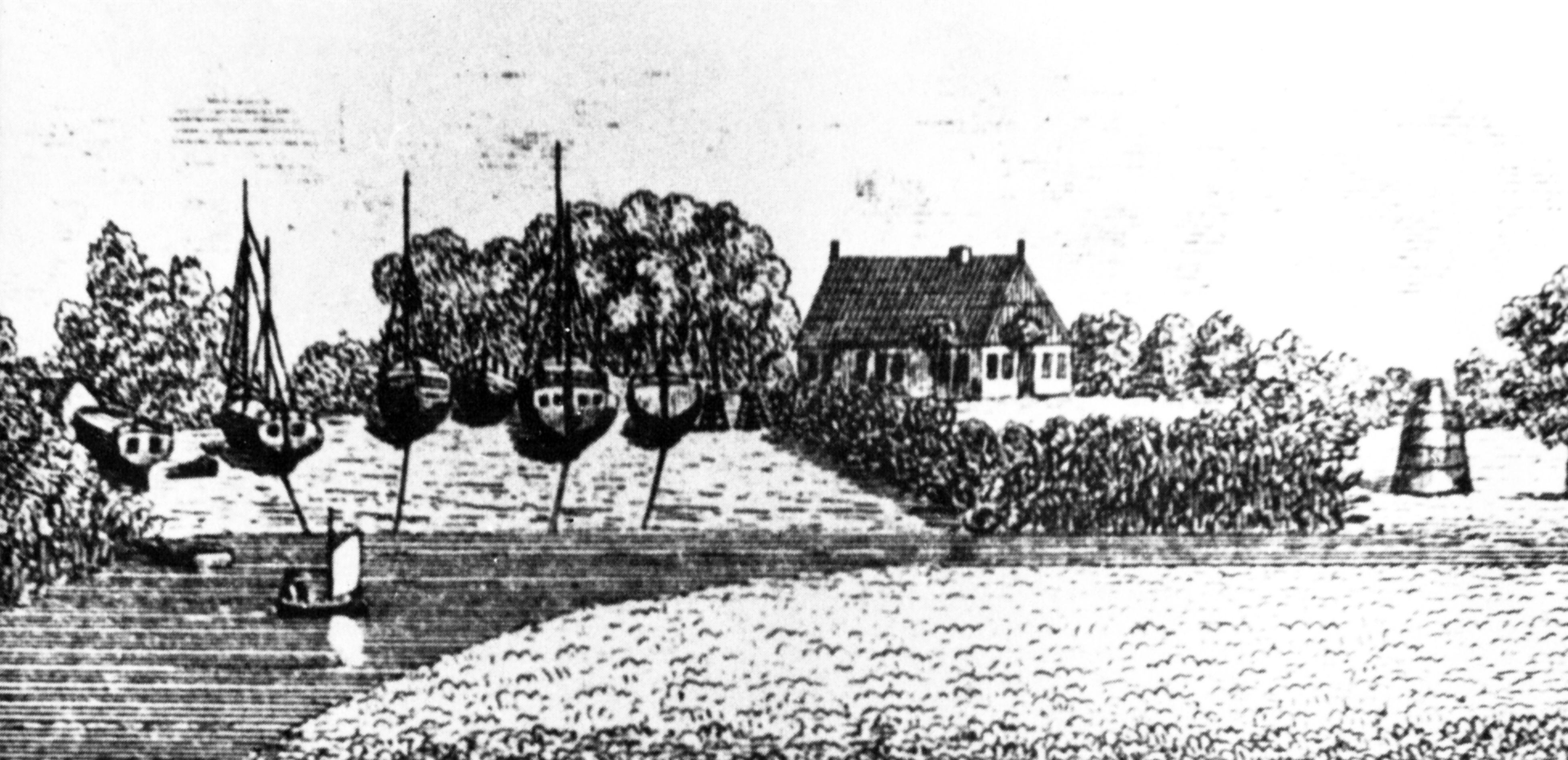 Die Finks Schiffswerft um 1850 in Moorrege an der Pinnau, kurz vor der Übernahme von Hans Jacobs. Quelle: Lithographie um 1850